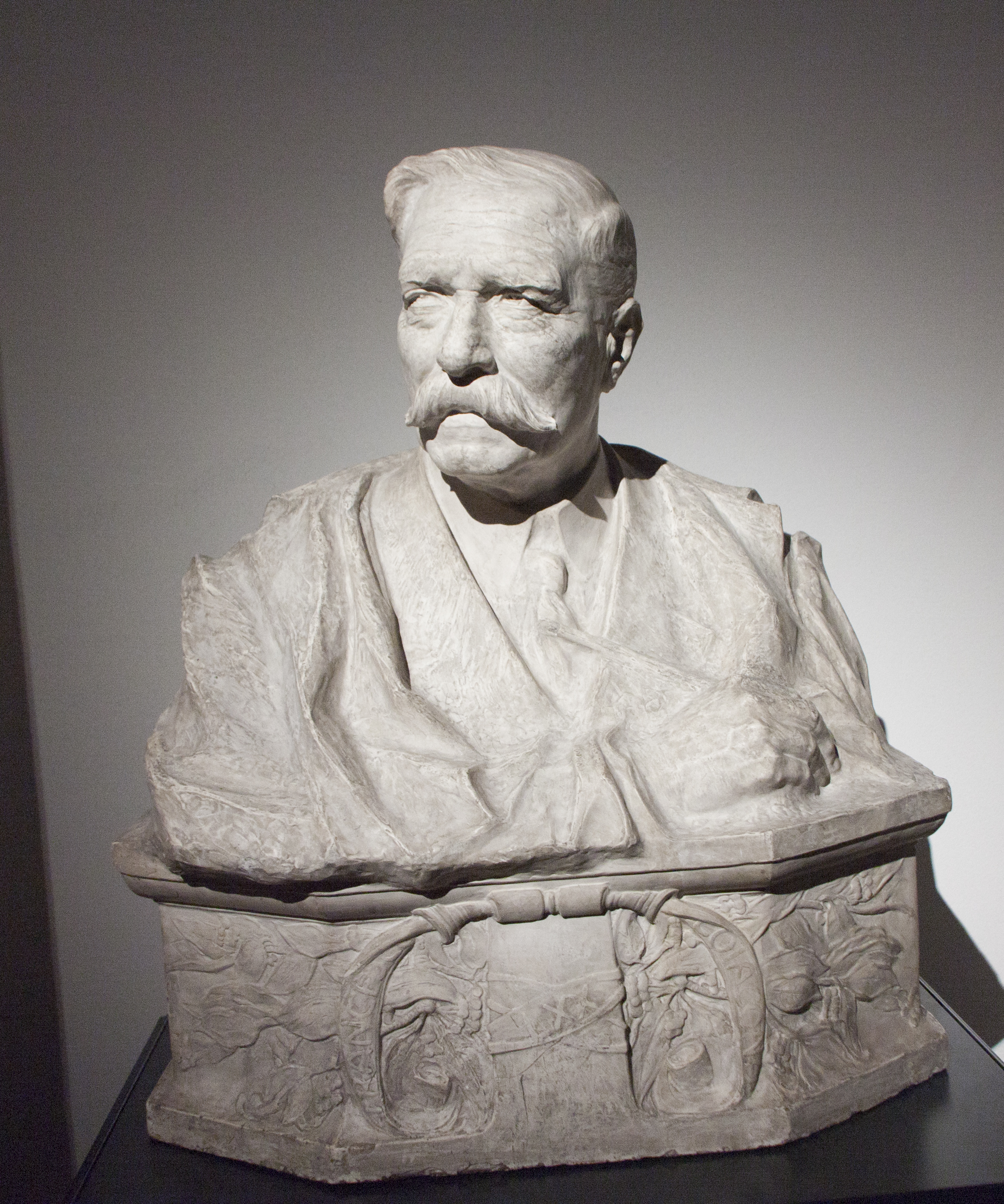 Busto di Francesco Lojacono - Archimede Campini 1830 ca